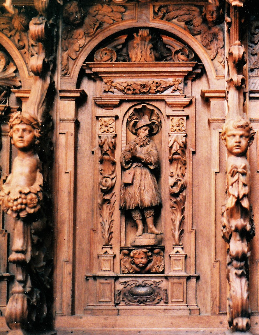 St. Maria (Buxheim): Chorgestühl von 1691 (Wilhelm von Mallavalle)